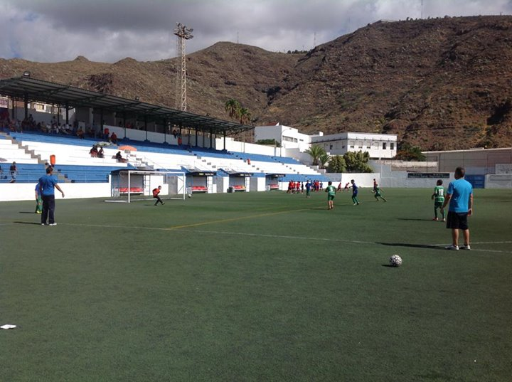 Campo de fútbol La Salud ubicado en el barrio homónimo de Santa Cruz de Tenerife.